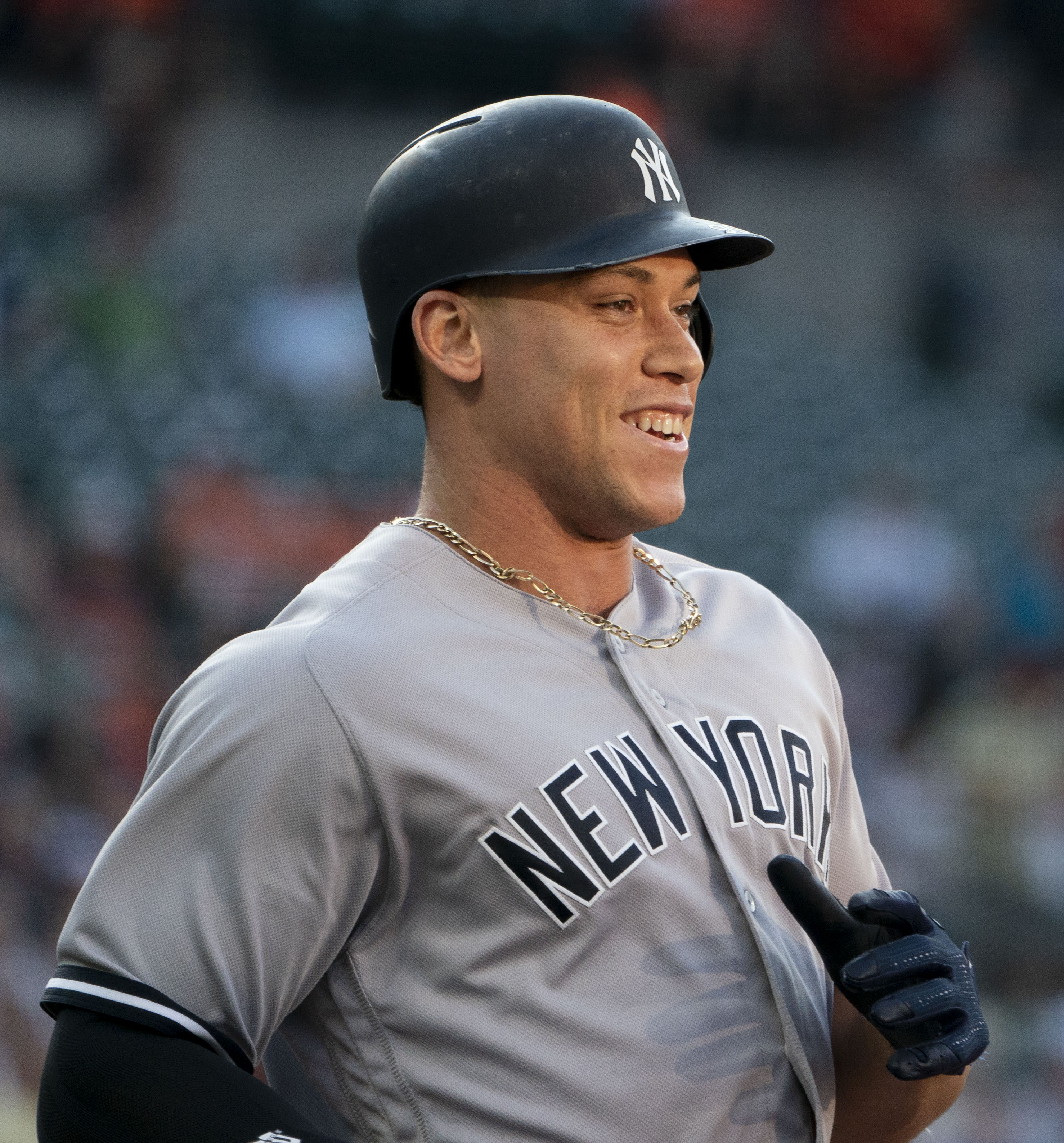 Yankees at Orioles 7/10/18